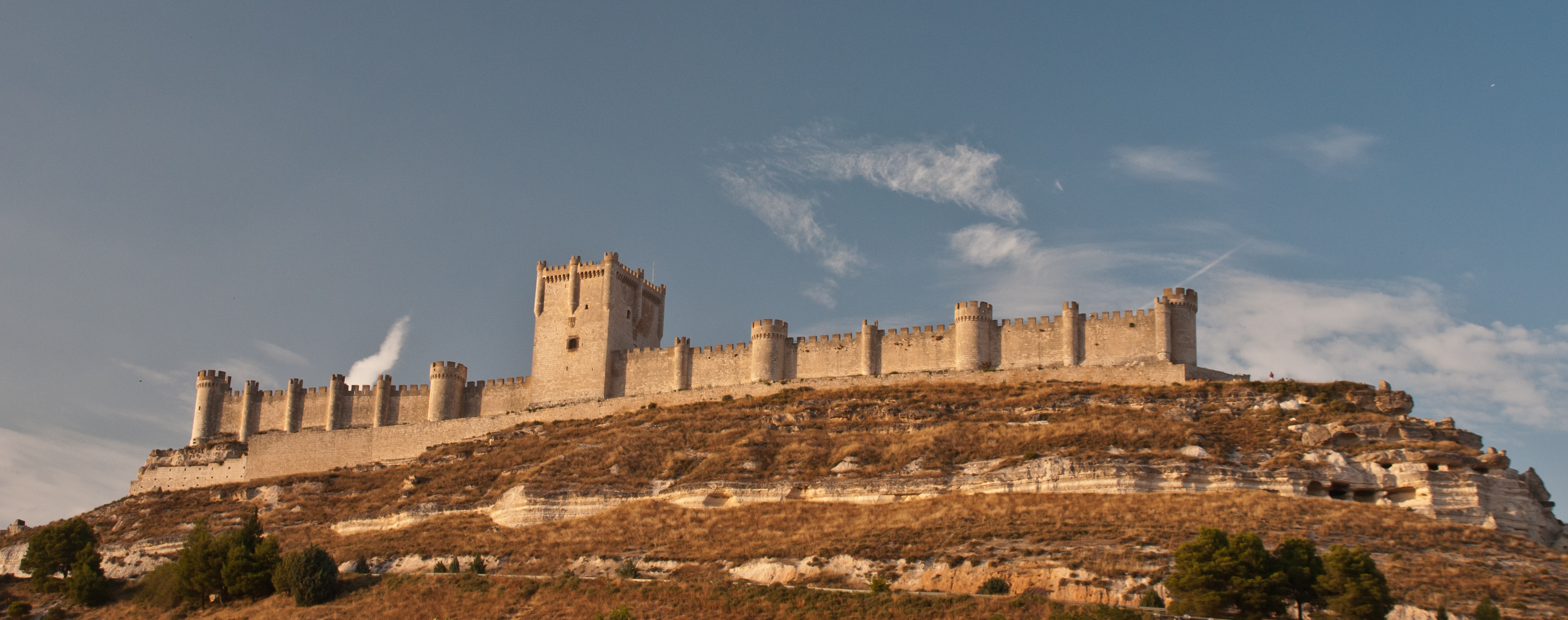 Panorámica del Castillo de Peñafiel